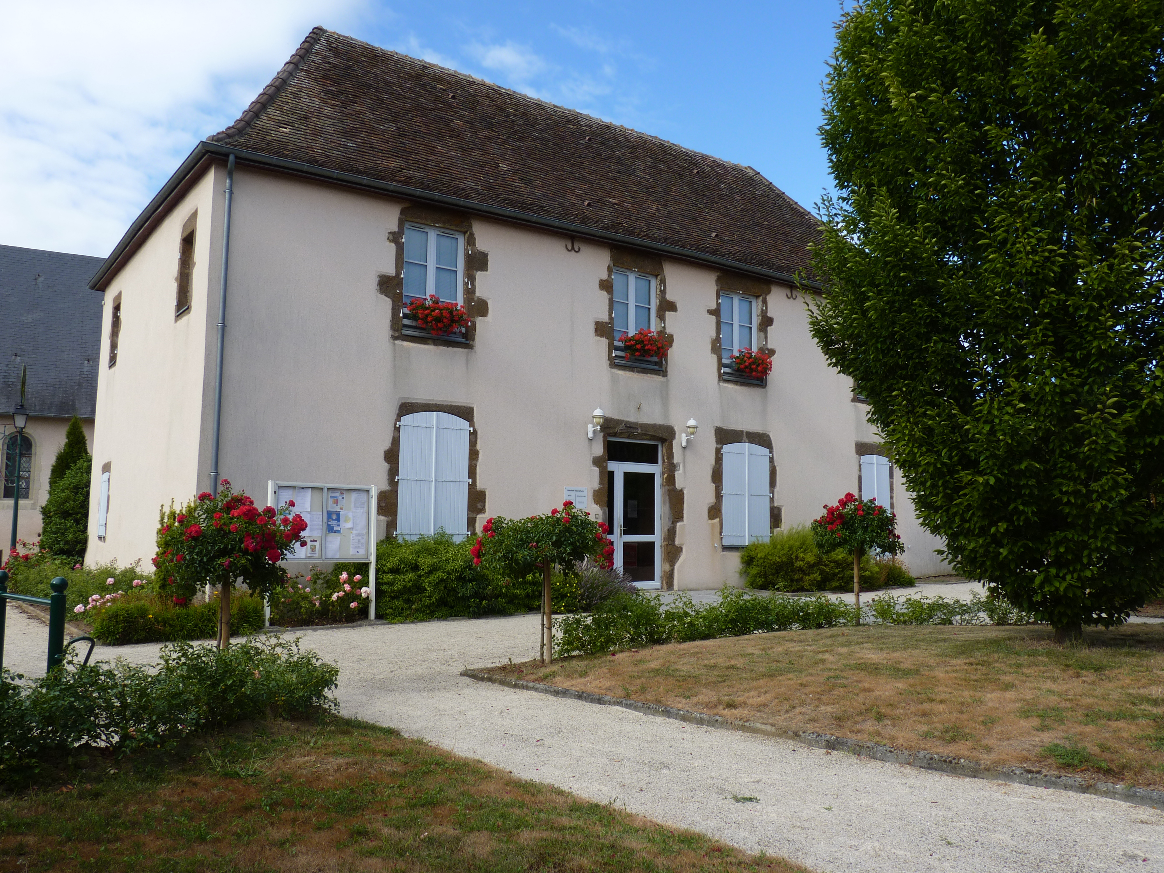 Sarthe - La Guierche - Mairie